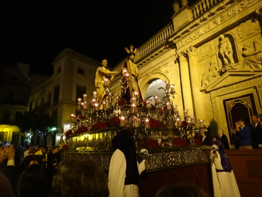 Semana Santa de Jerez (Andalucía, España)